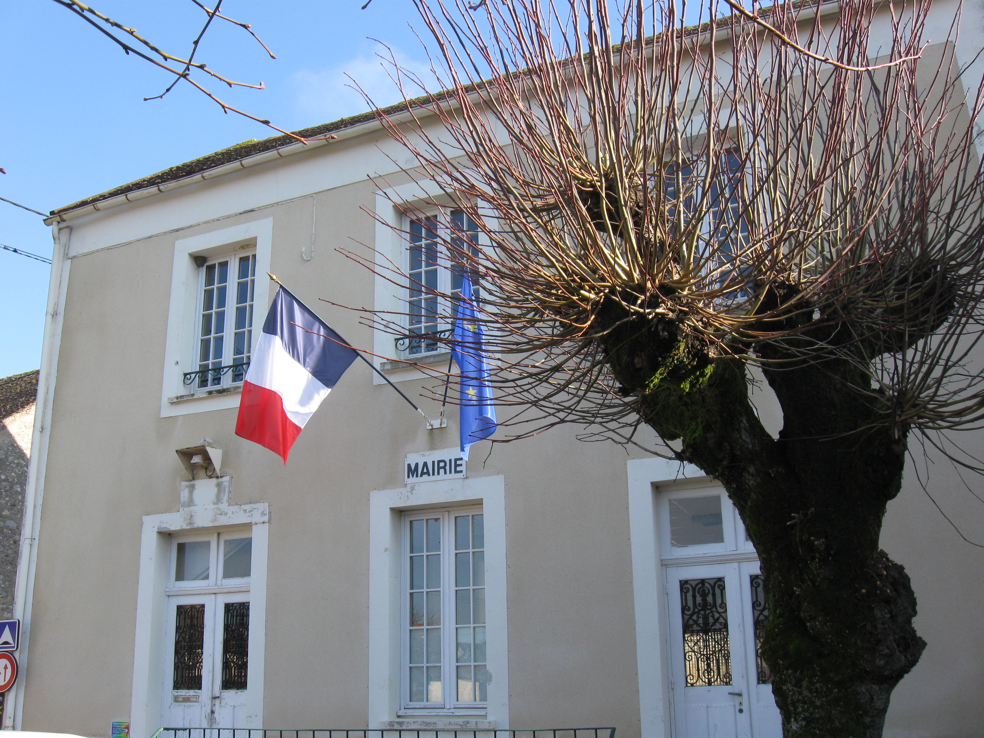 Mairie de Noisy-Rudignon. (Seine-et-Marne, région Île-de-France).